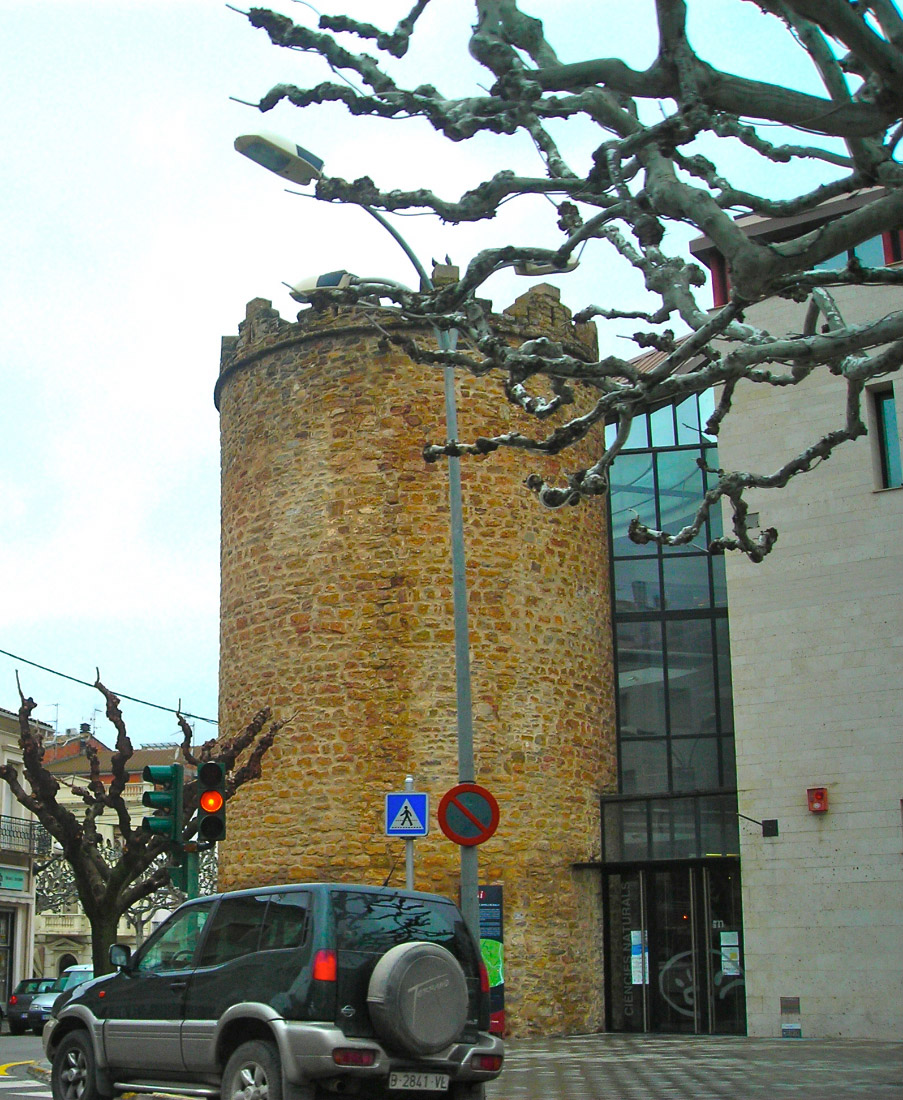 Torre de Soldevila, de la muralla de Tremp (Pallars Jussà)